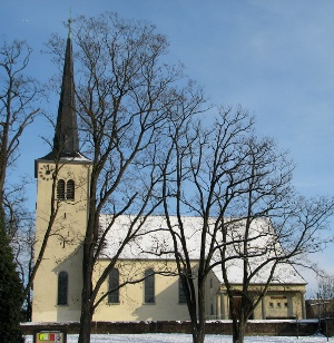 Auferstehungskirche in Mannheim-Käfertal.